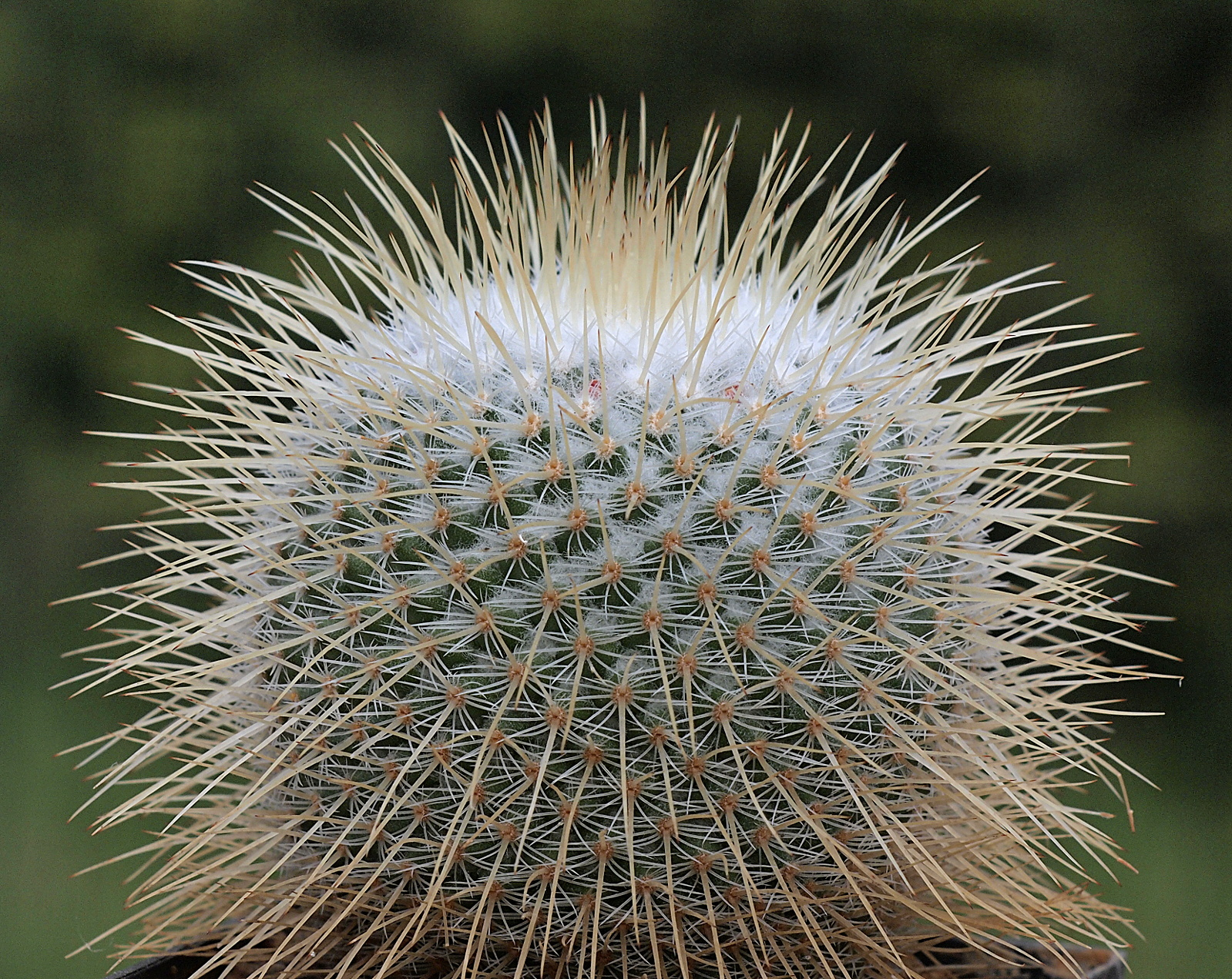 Mammillaria dixanthocentron P 325